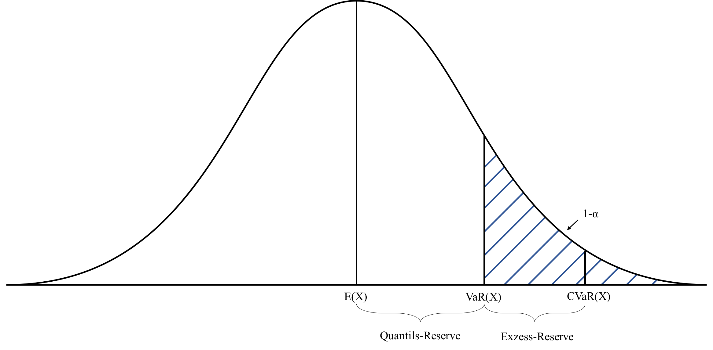 Darstellung des Conditional Value at Risk